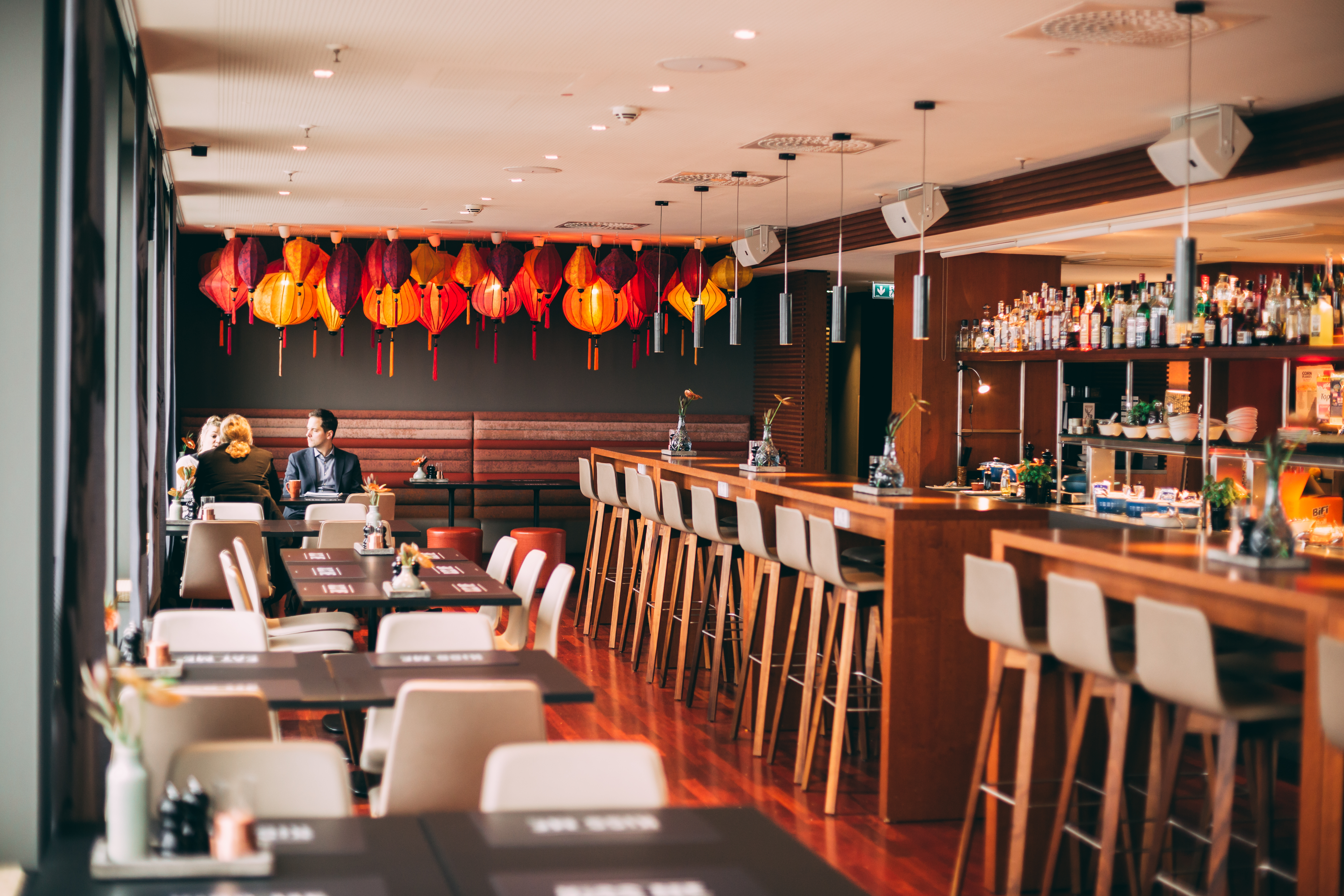 Skybar im me and all hotel düsseldorf